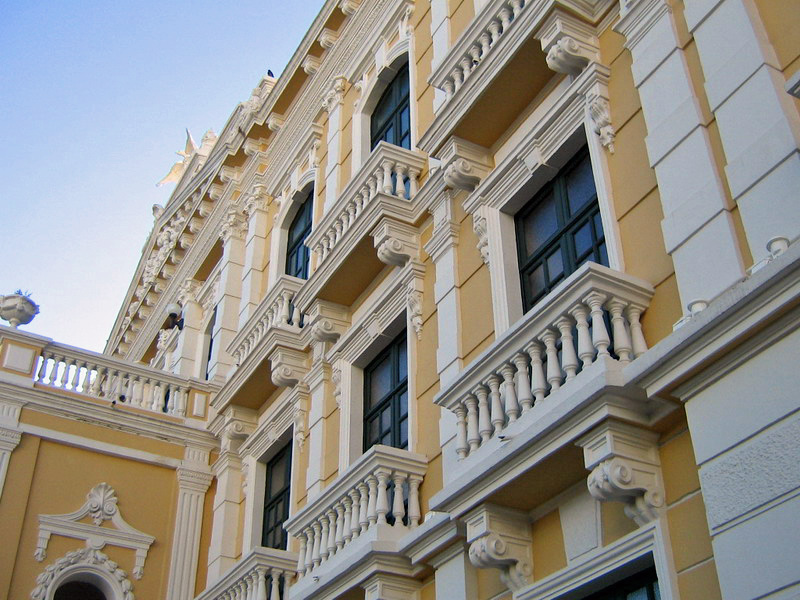 Palácio Anchieta (Anchieta's Palace), downtown, Vitória, state of Espírito Santo, Brazil.